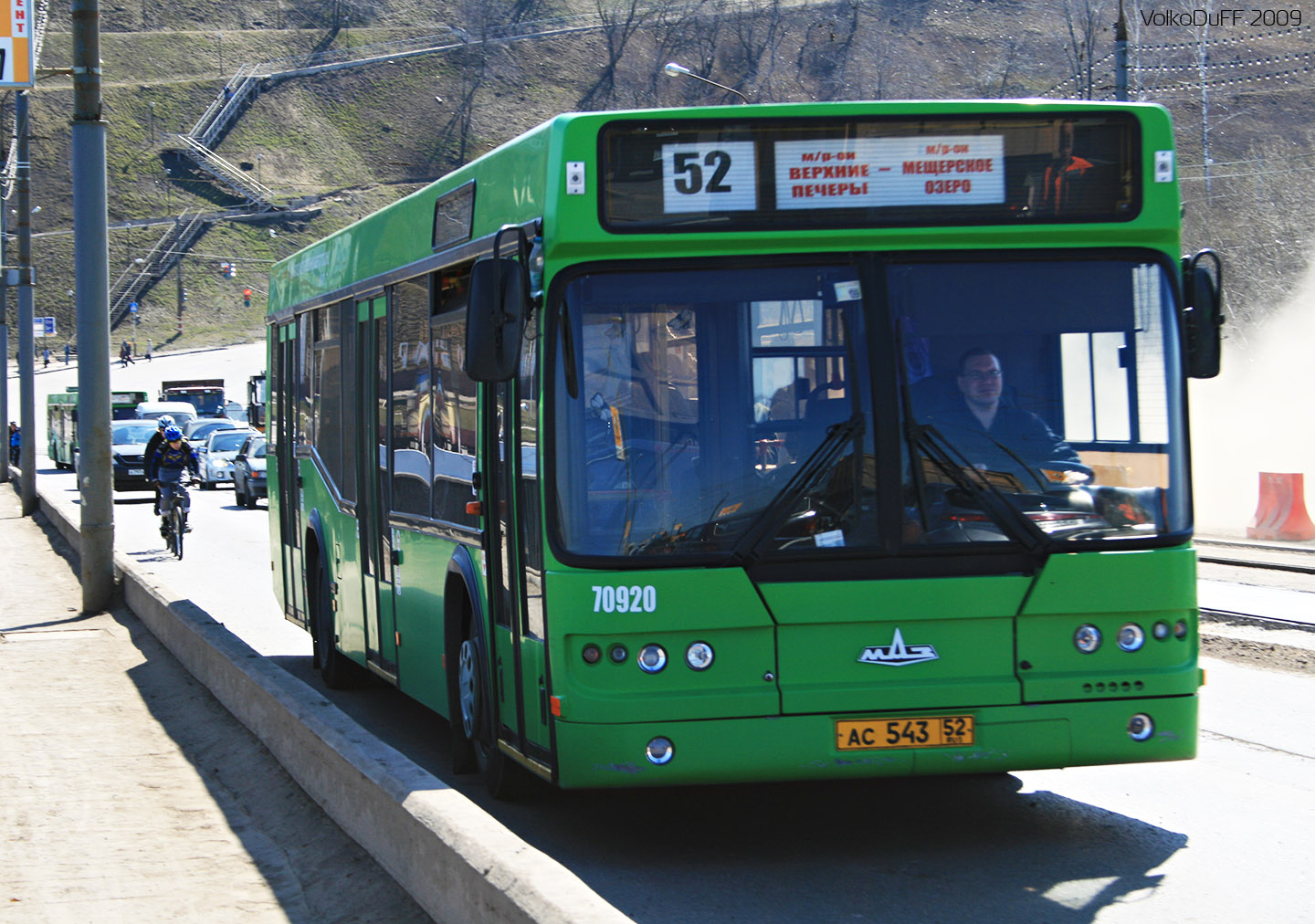 МАЗ-103 завода Самотлор-НН в Нижнем Новгороде